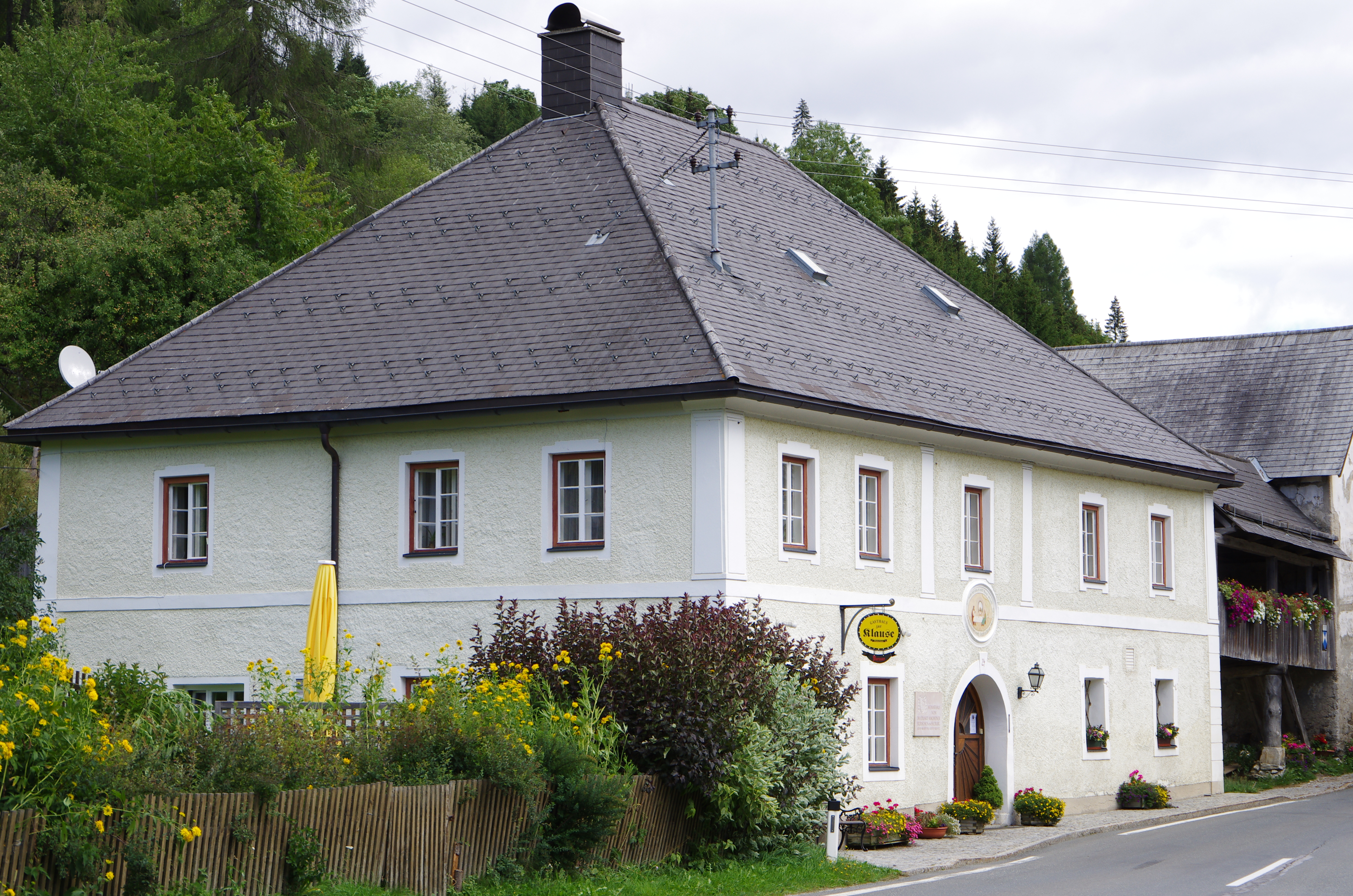 Gasthof zur Klause mit Getreidekasten, Verbindungsgang und Kapelle